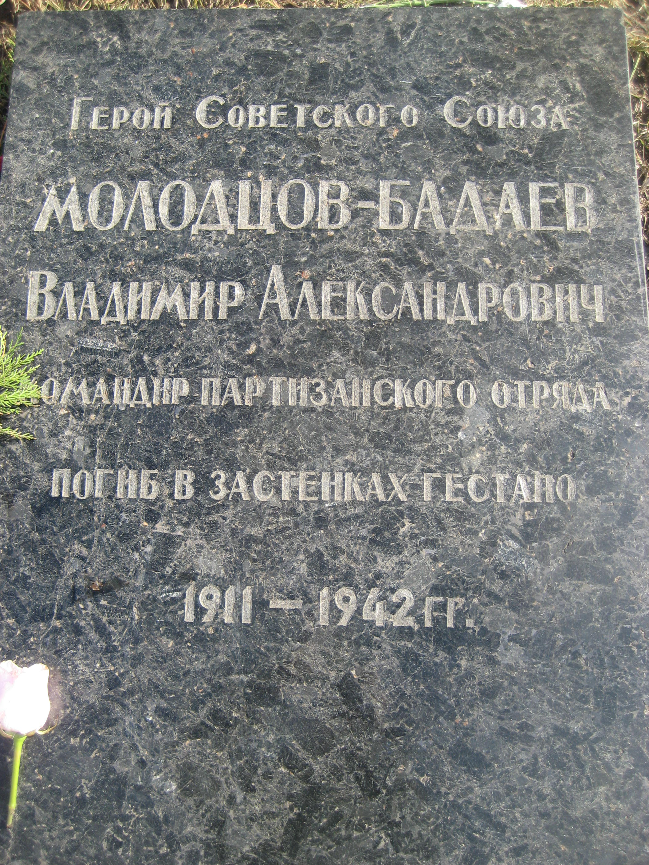 Кенотаф Молодцова-Бадаева на аллее Славы в Одессе